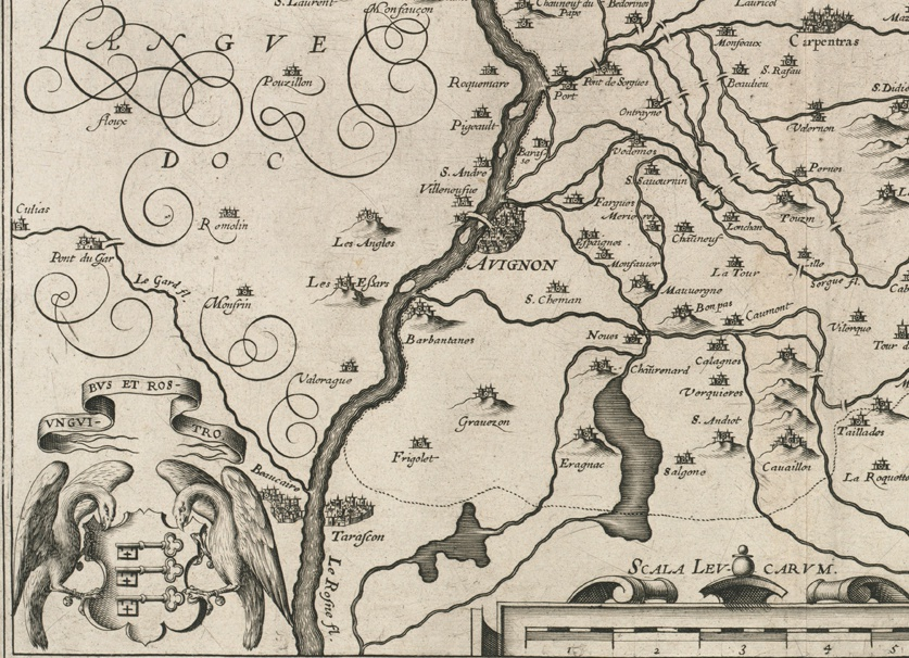 Carte de Graveson, d'Avignon et du Comtat Venaissin 1620 Dessinateur : Jean Picquet, éditeur : Jean Leclerc